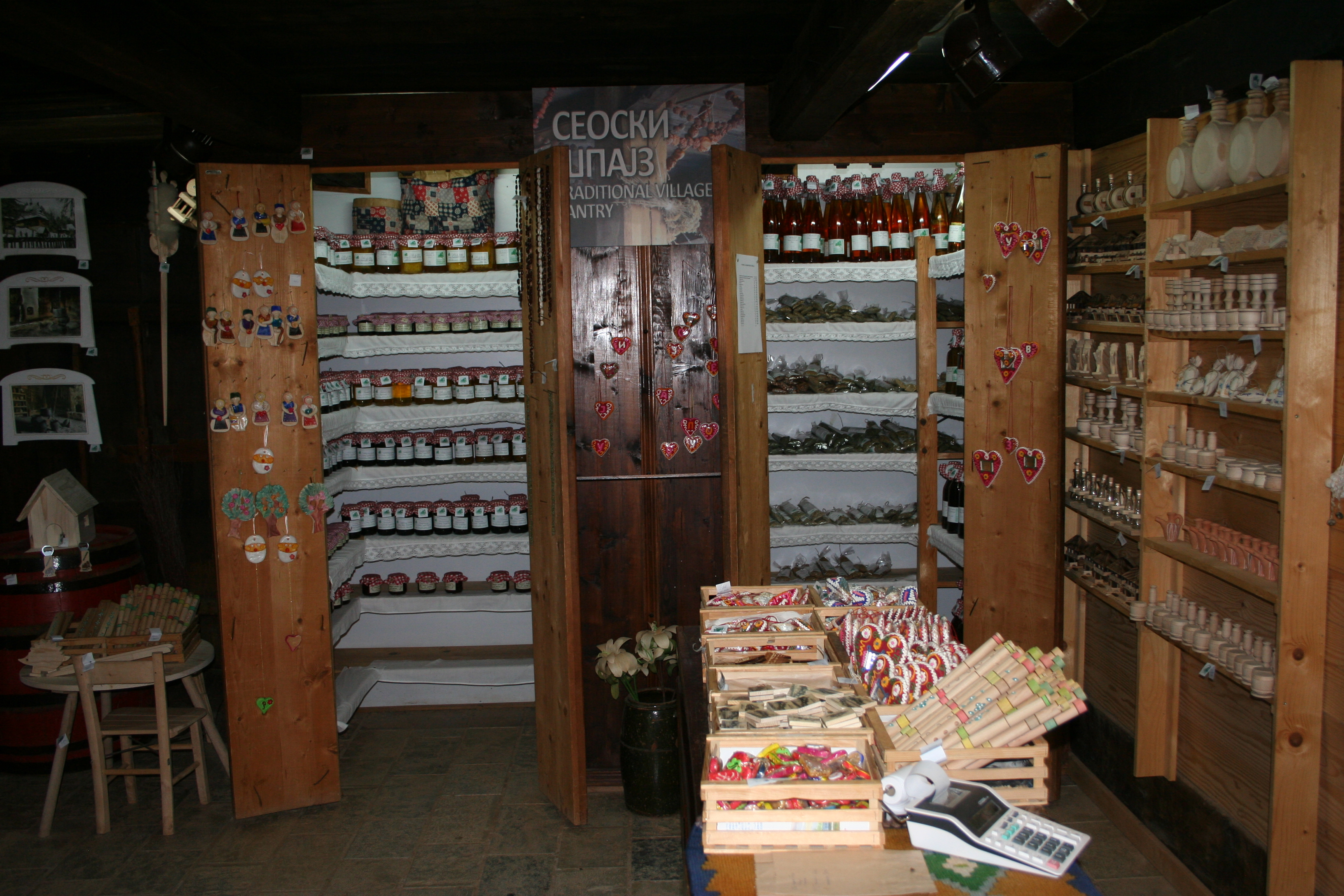 Muzej "Staro selo" Sirogojno